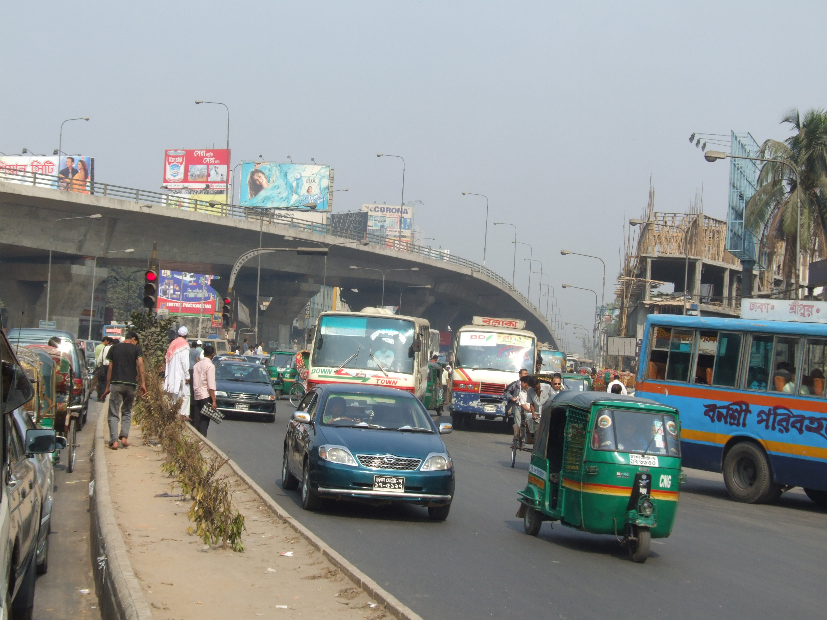 Mohakhali flyover in Dhaka, Bangladesh.